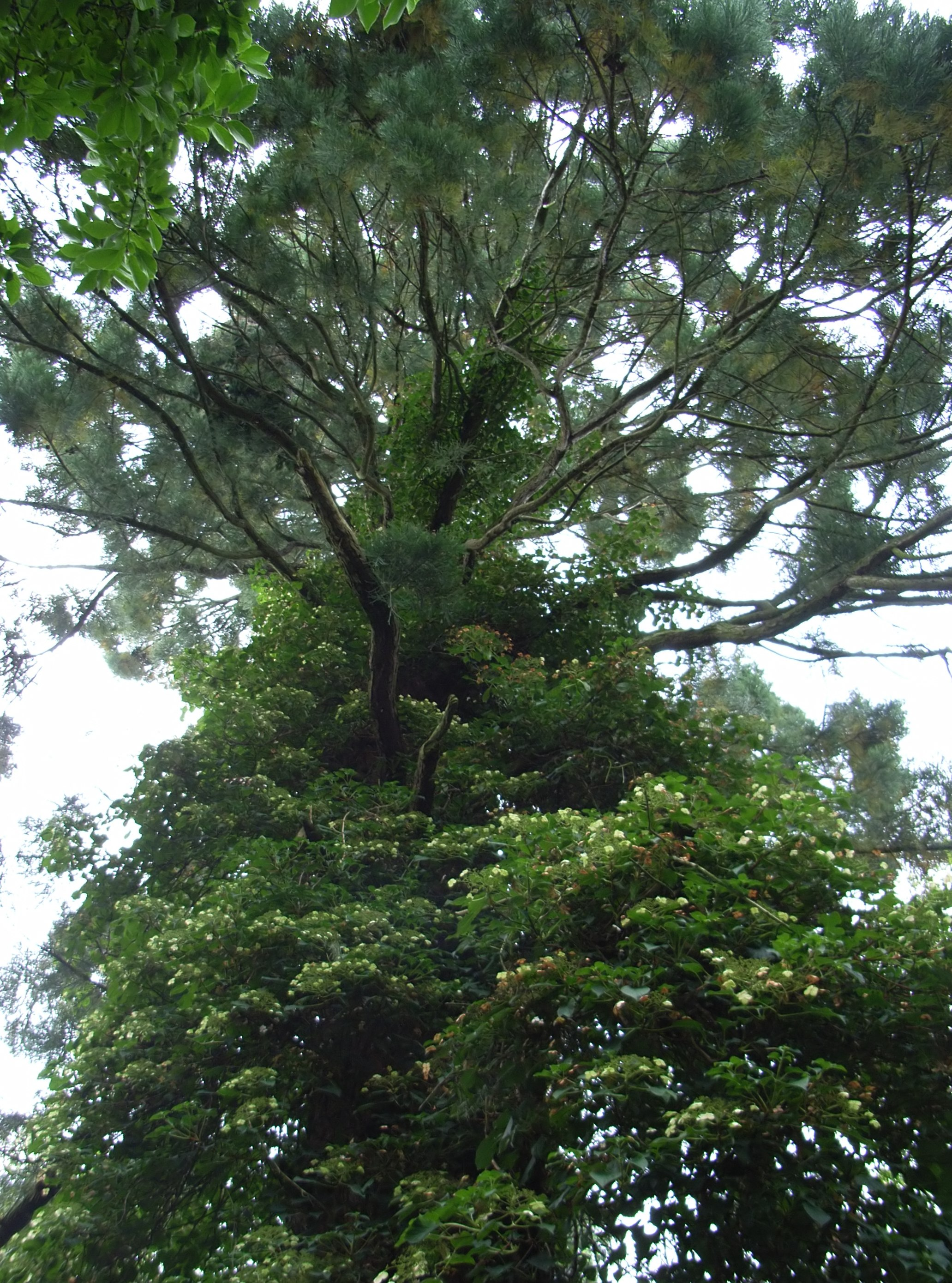 Sequoiadendron giganteum, Hydrangea anomala subspec. petiolaris